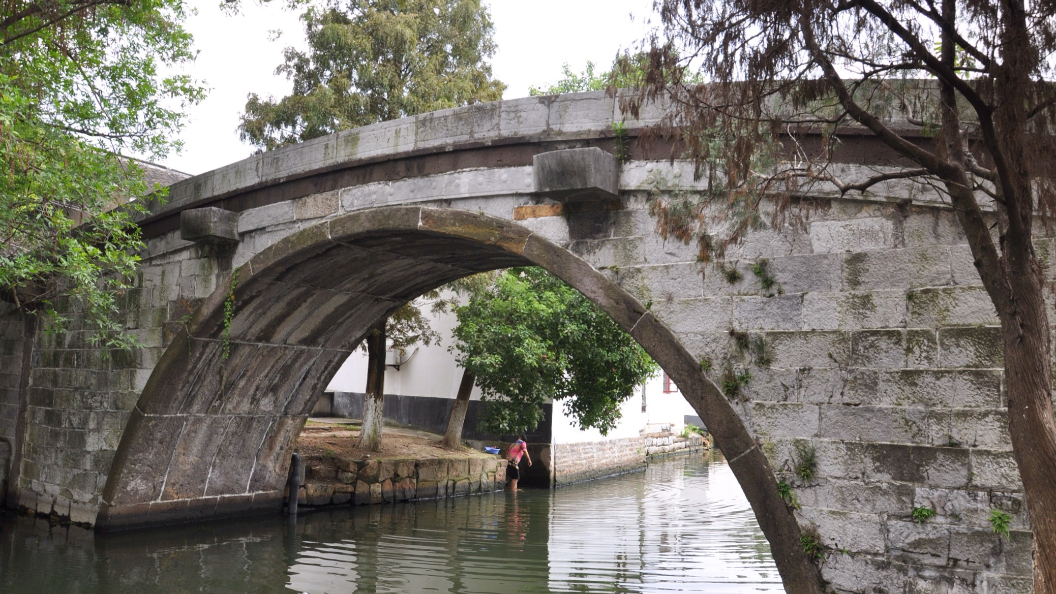 万安桥 青浦区金泽镇北市